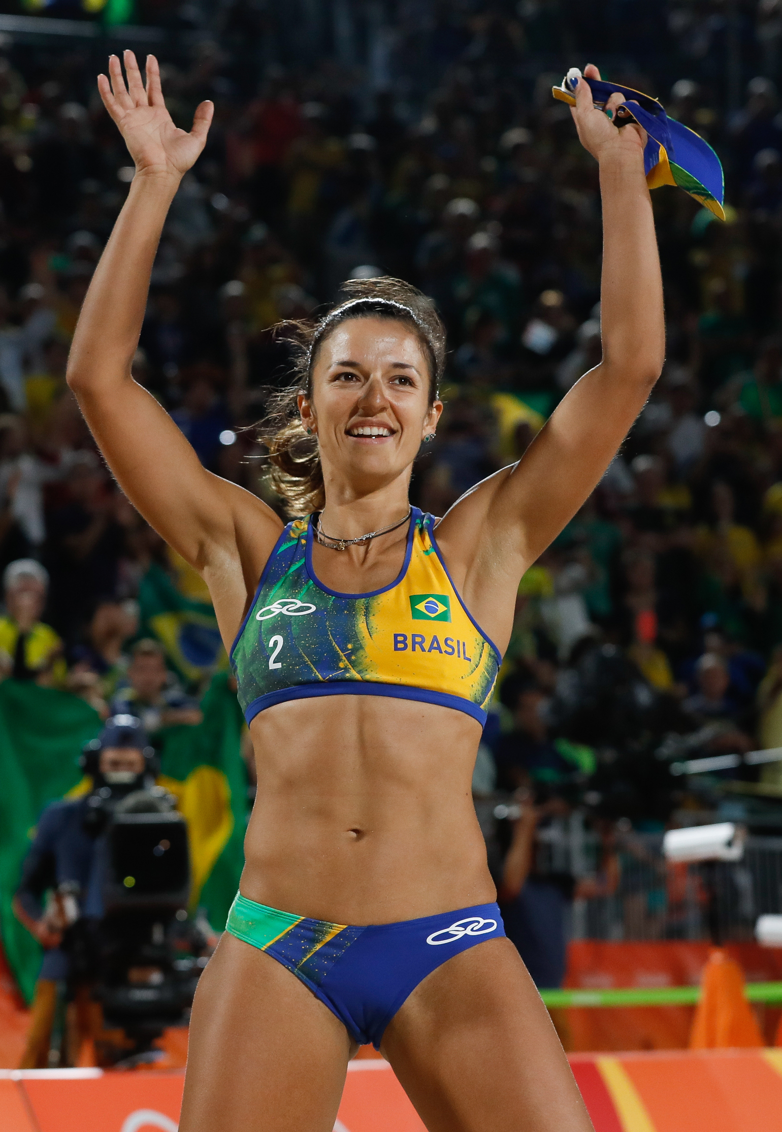 Brasileiras levam a prata no vôlei de praia